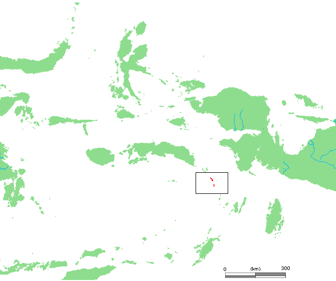 ID Watubela.PNG